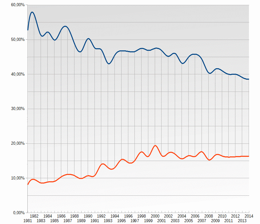 Wykres Dominicantes i Communicantes w latach 1980-2014